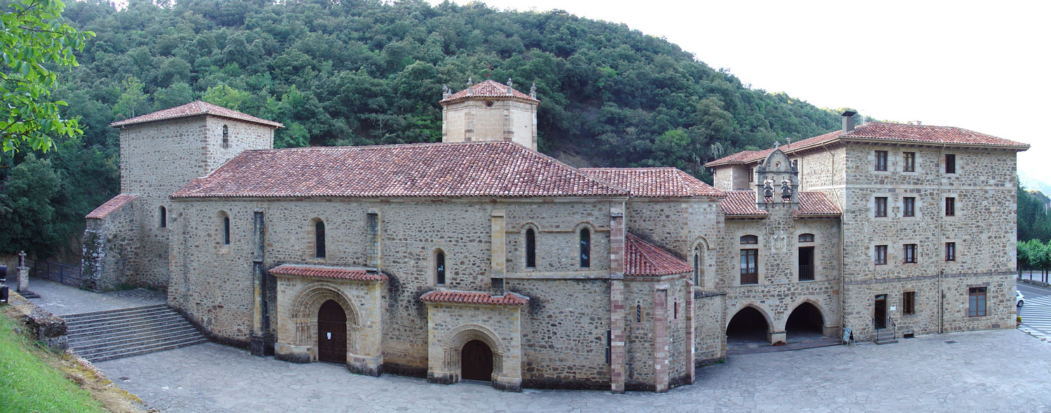 Vista panorámica del Monasterio de Santo Toribio de Liébana en Cantabria, España (Spain).